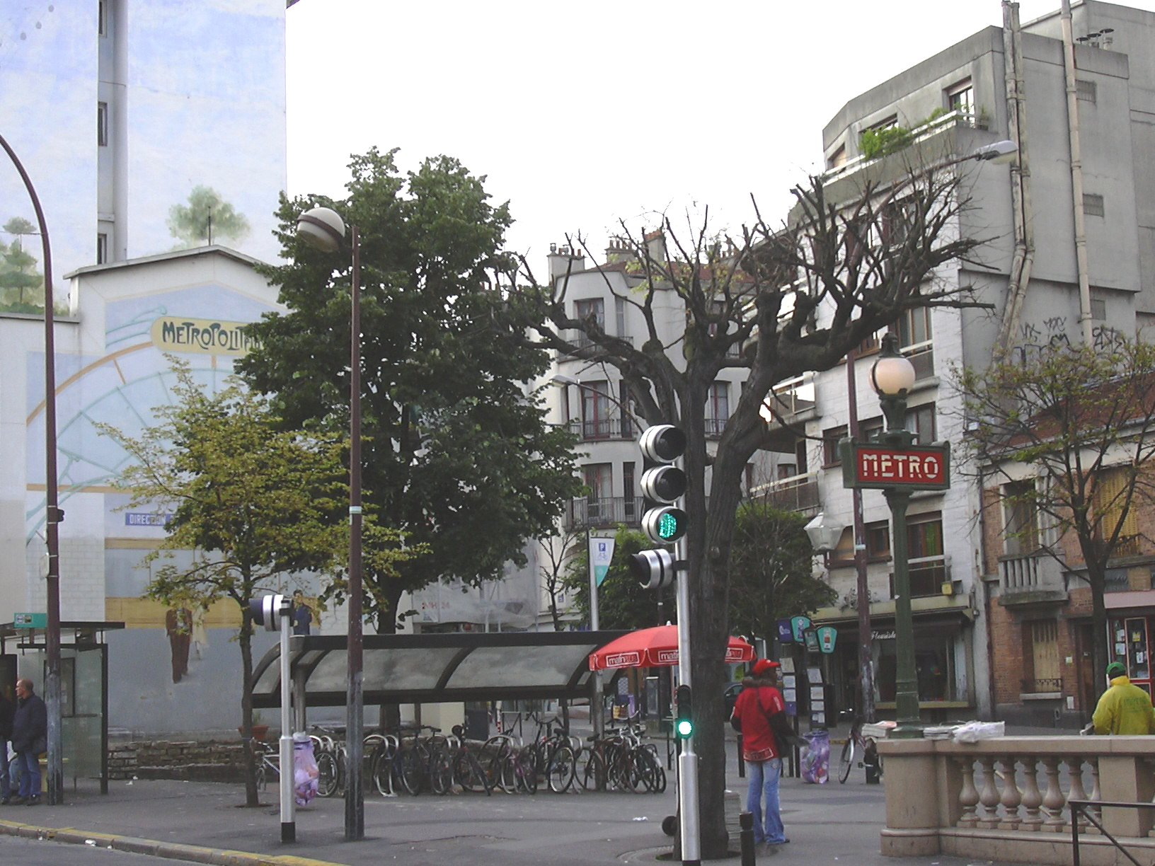 Metro des lilas 93260 FRANCE